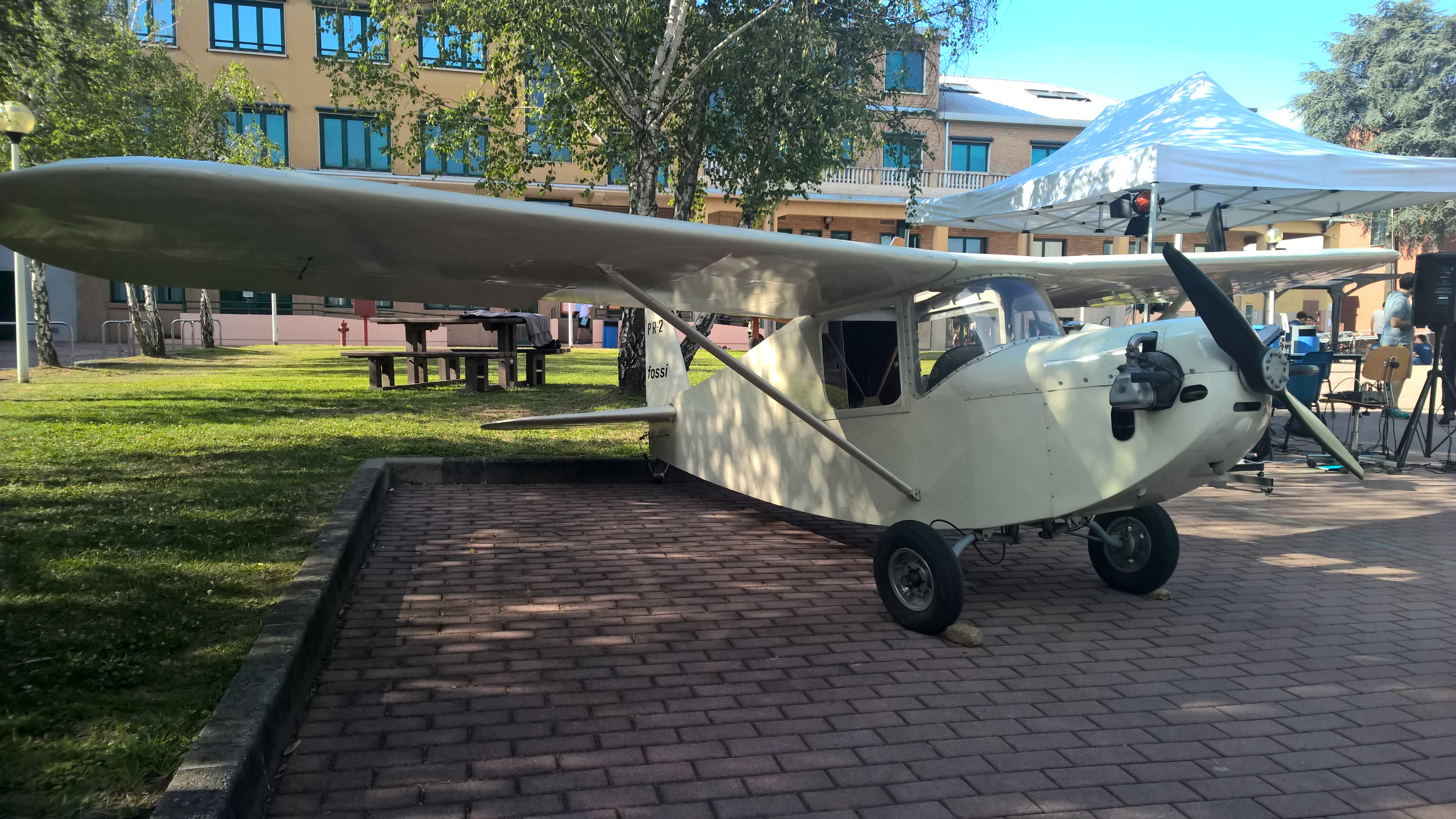 Un esemplare di Saltafossi esposto temporaneamente al Politecnico di Milano (Bovisa) durante una festa degli alumni di ingegneria aerospaziale (2018).